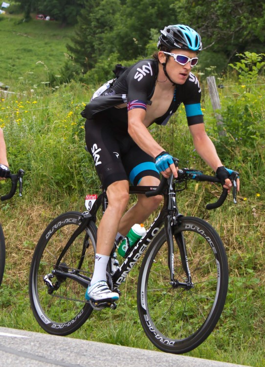 430 stqnnqrd en tho;qs